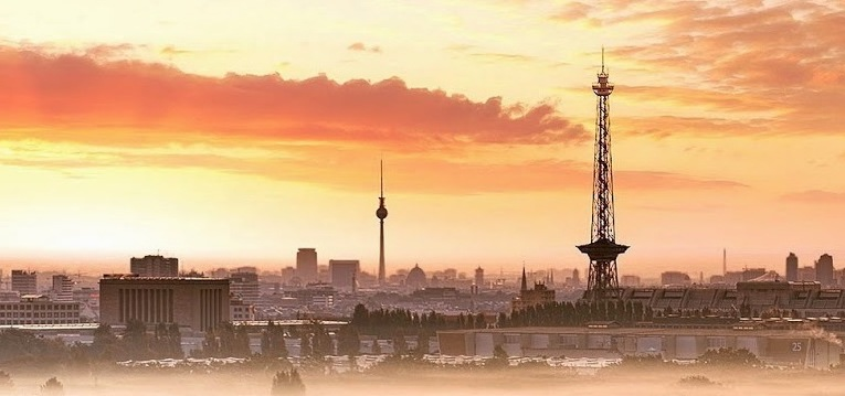 Berlin Panorama 2014